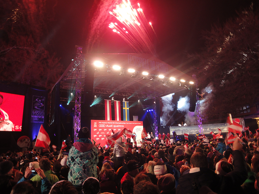 Siegerehrung nach dem Damen-Slalom auf der Medal Plaza in Garmisch im Rahmen der alpinen Ski-WM 2011